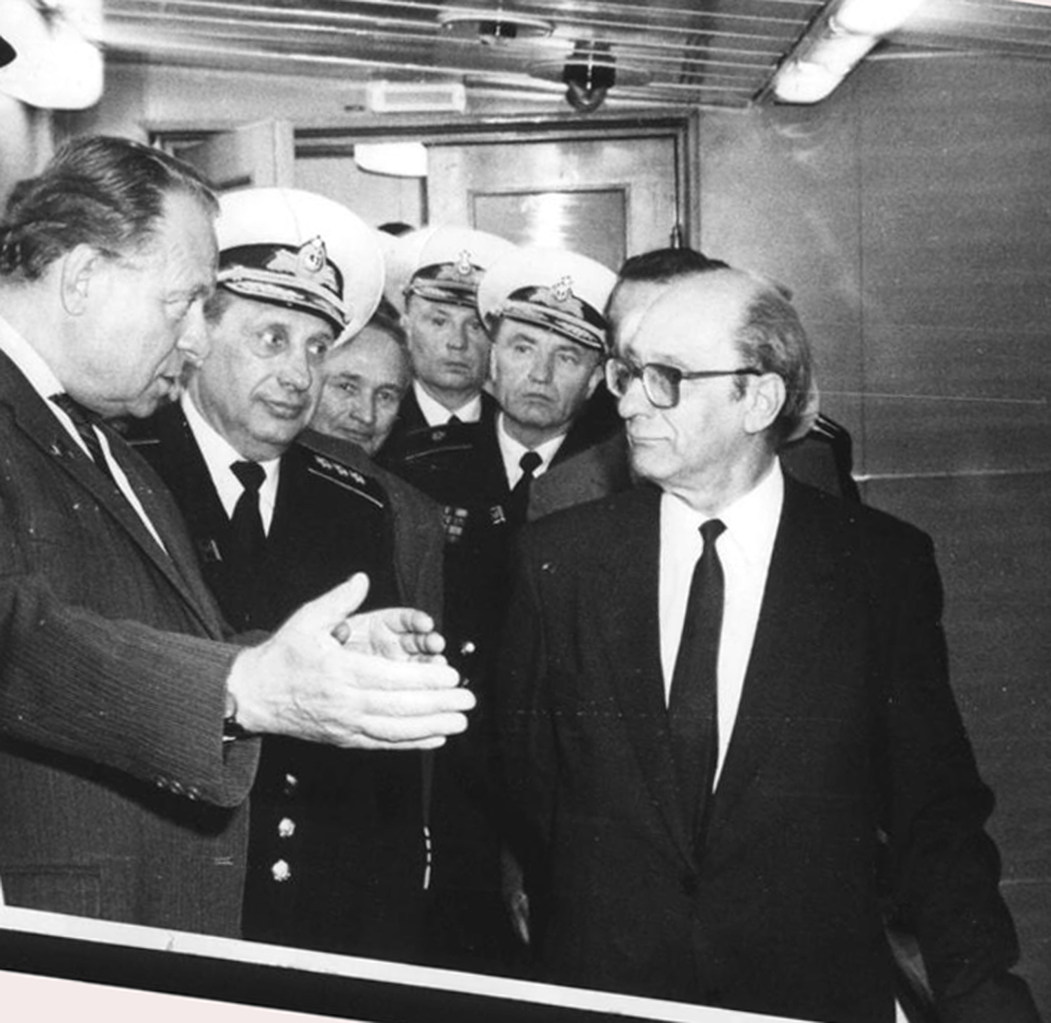 1984 год. Главный конструктор Дмитрий Георгиевич Соколов на "Маршале Неделине". В группе офицеров и адмиралов первый секретарь Ленинградского обкома КПСС Л.Зайков. Ленинградское адмиралтейское объединение.